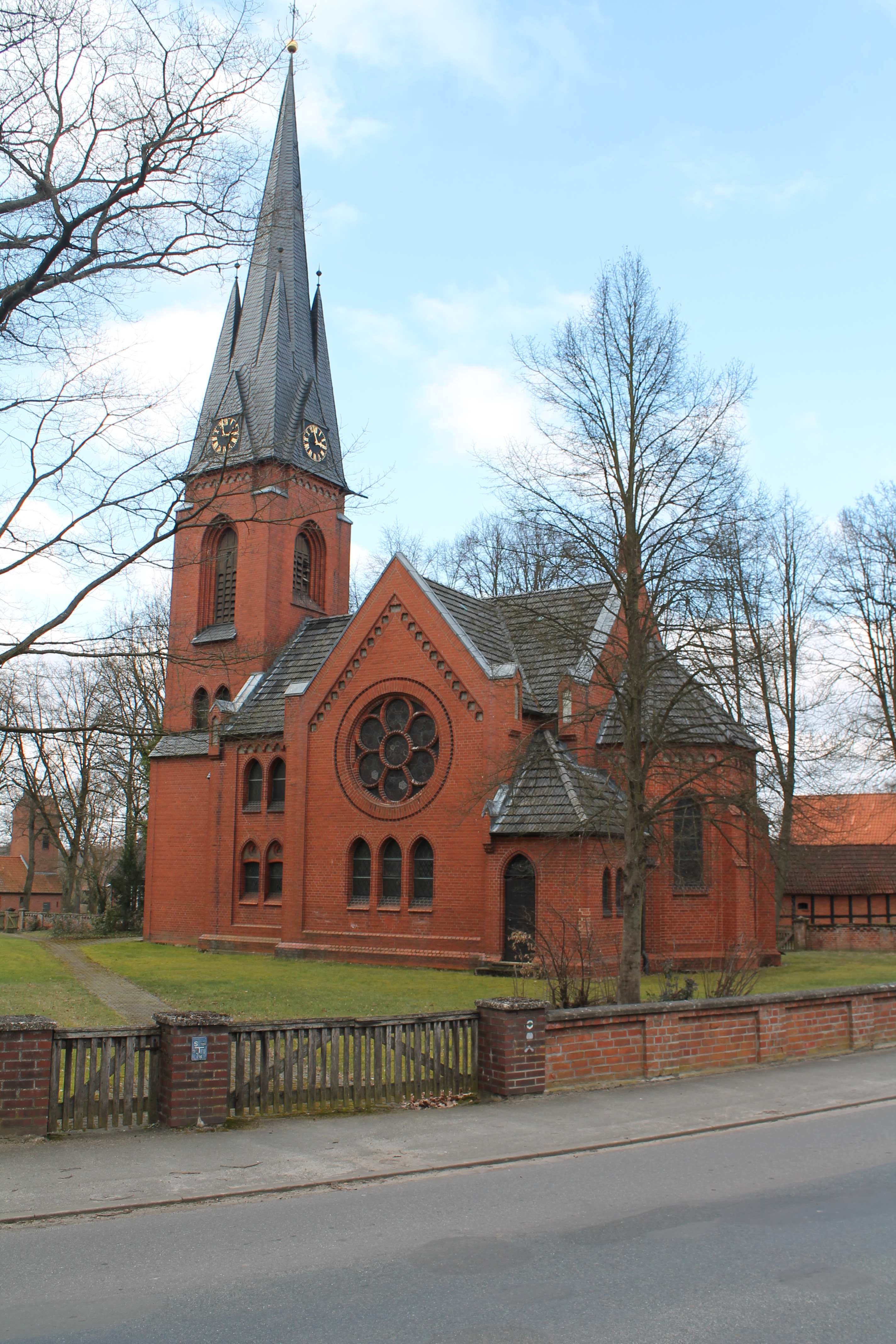 Außenansicht der Kirche Ostedt